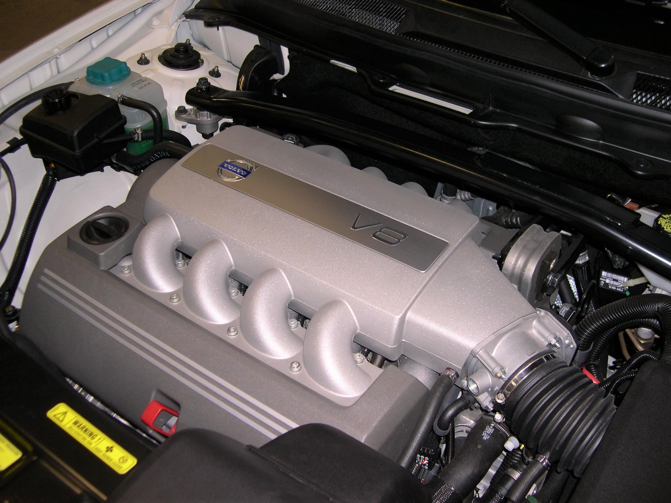 2006 Volvo XC90 V8 engine